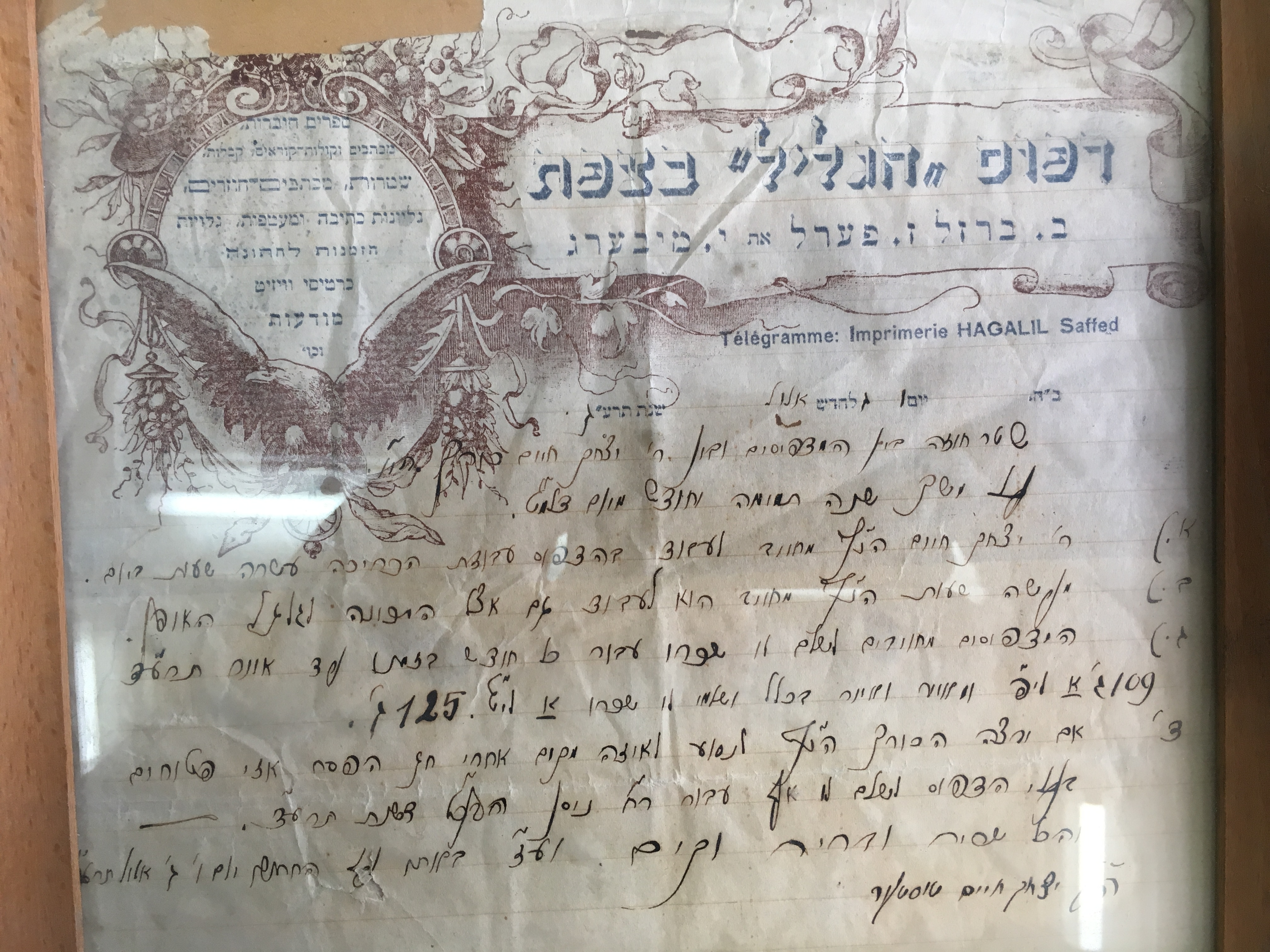 הסכם עבודה שנעשה ב1913 בין דפוס הגליל צפת ובין העובד יצחק חיים טוסטער